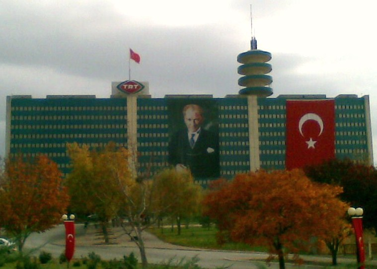 TRT Ankara binası